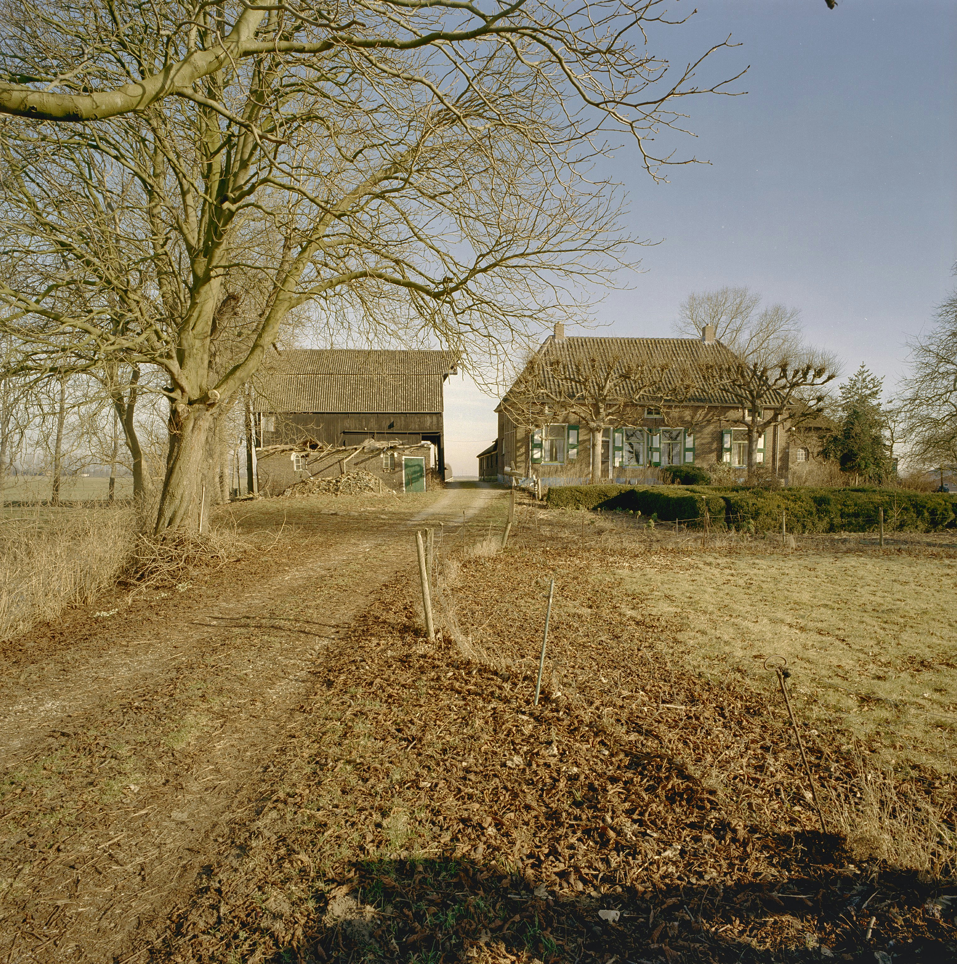 Exterieur overzicht boerderij met kapschuur